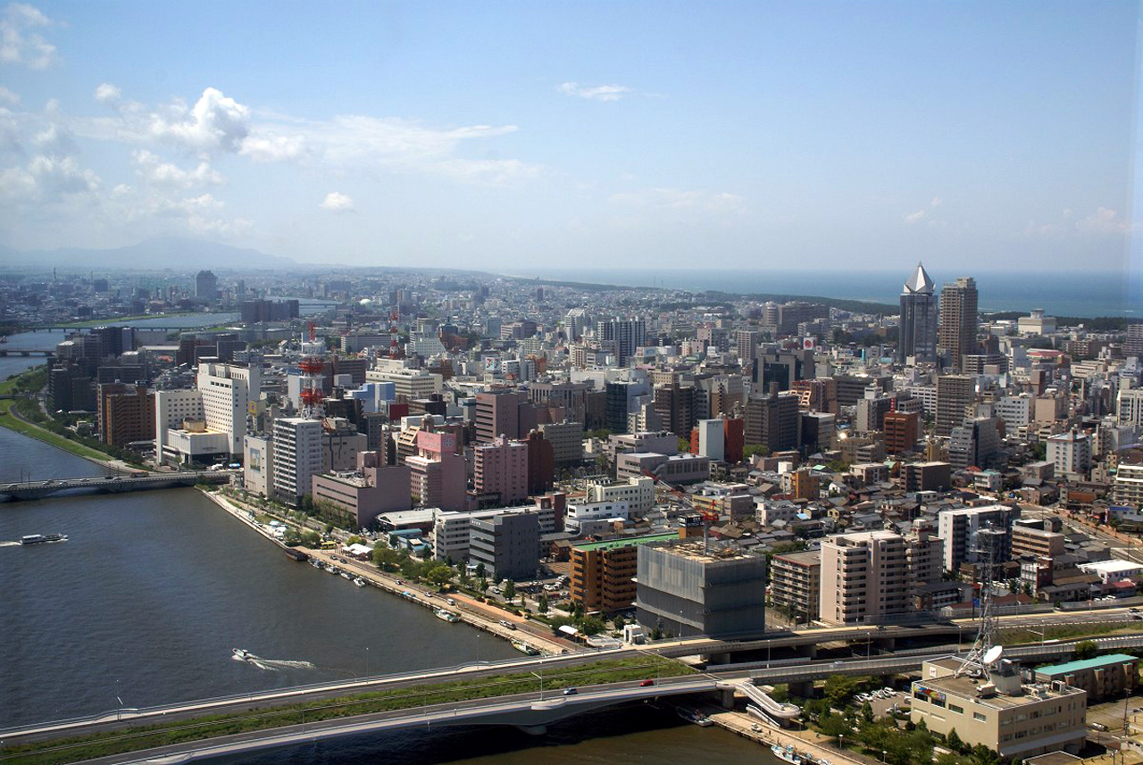 朱鷺メッセより、新潟島を望む。